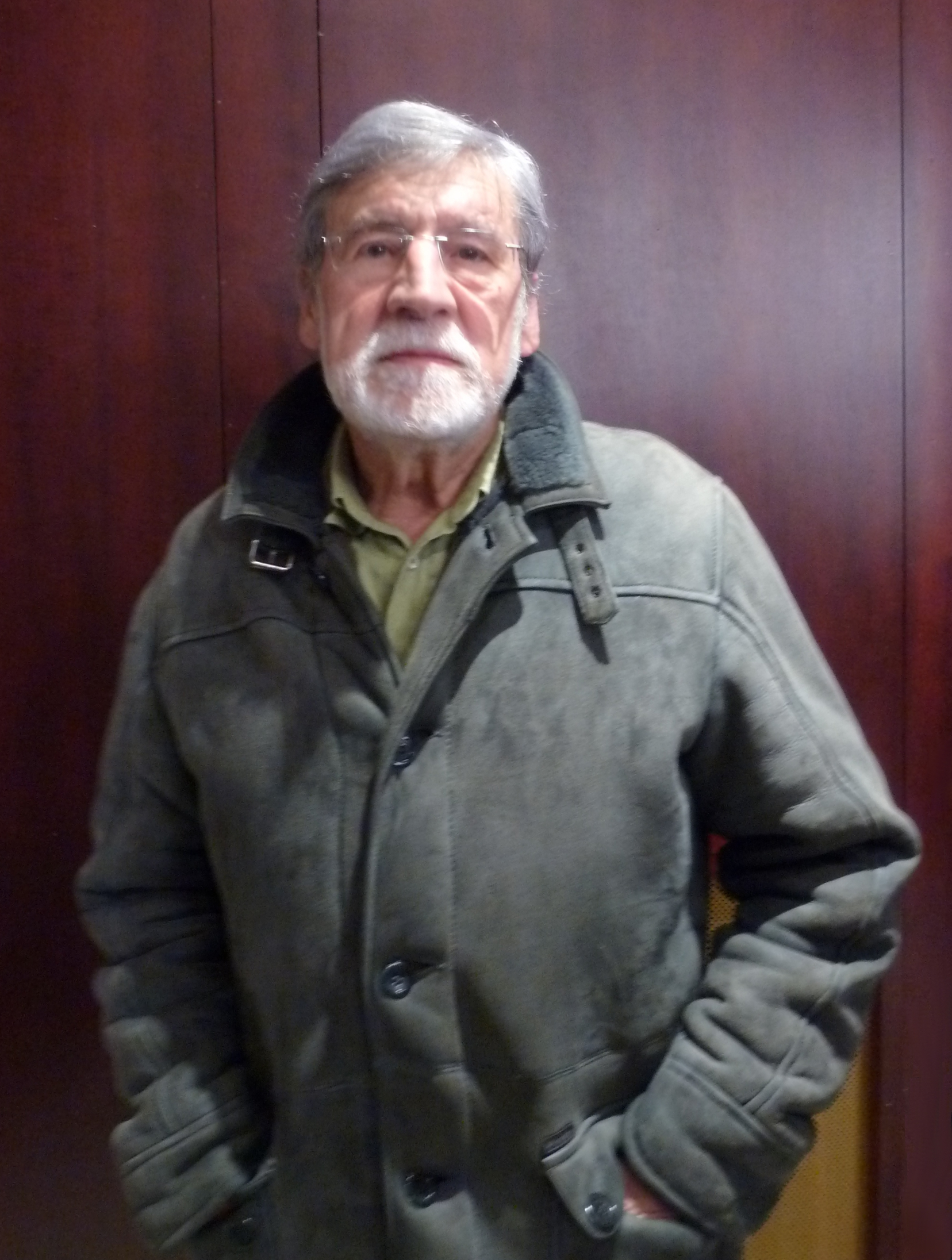 Xosé Lois Bernal “Farruco” na gala dos premios María Casares 2014.